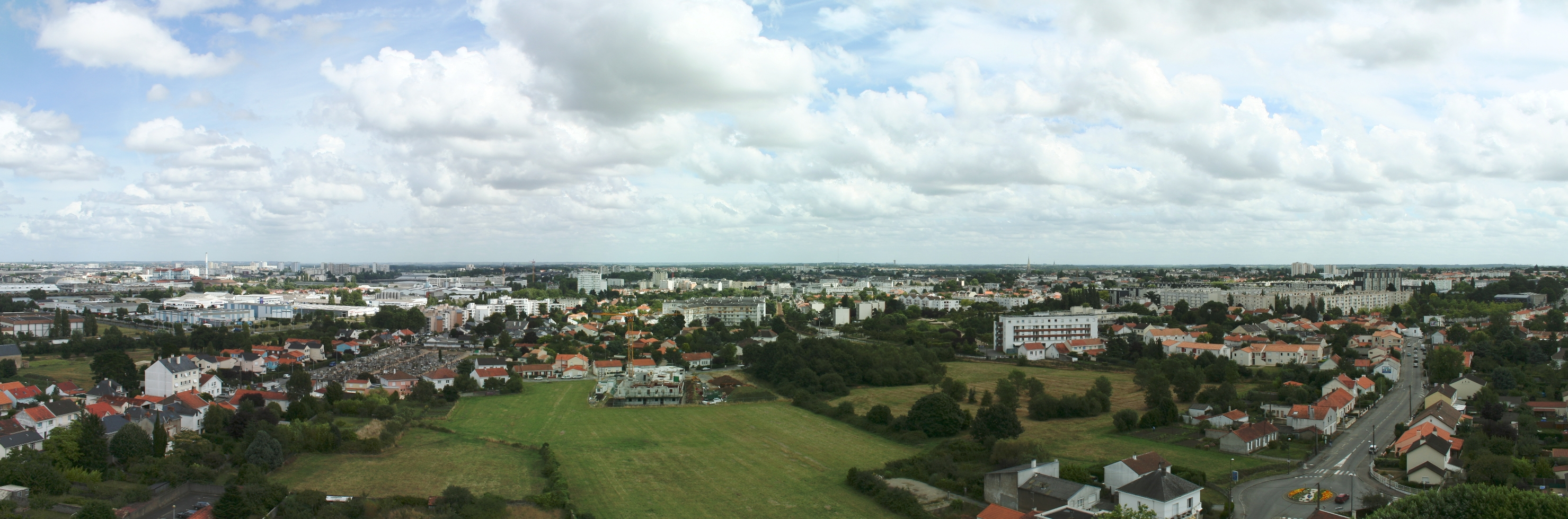 Vue panoramique de la ville de Rezé (Loire-Atlantique) prise au 6e étage de la maison radieuse (Architecte : Le Corbusier)